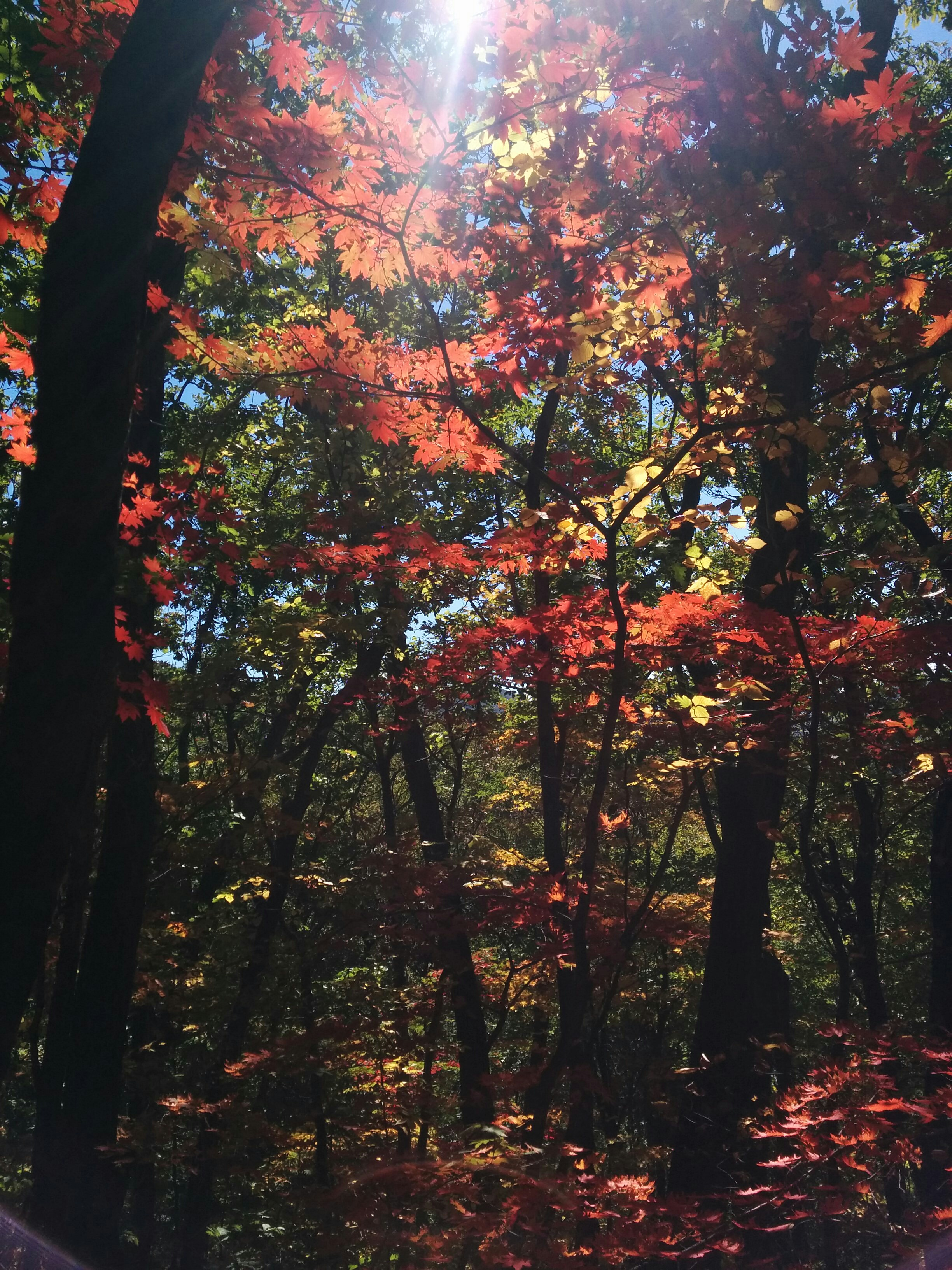 Benxi, Liaoning, China